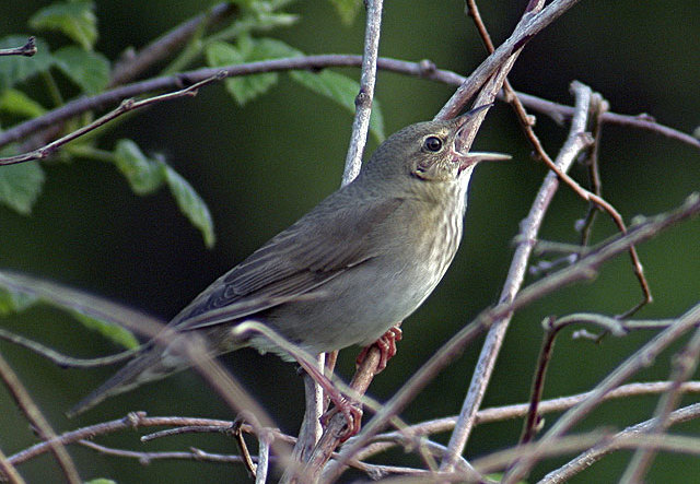 Flodsångare (Locustella fluviatilis) fotograferad i Horred, Västergötland, Sverige.